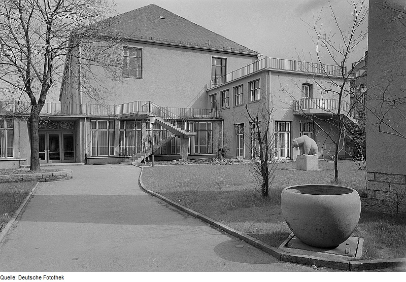 Original image description from the Deutsche FotothekDresden. Technische Universität, Alte Mensa, Gartenhof